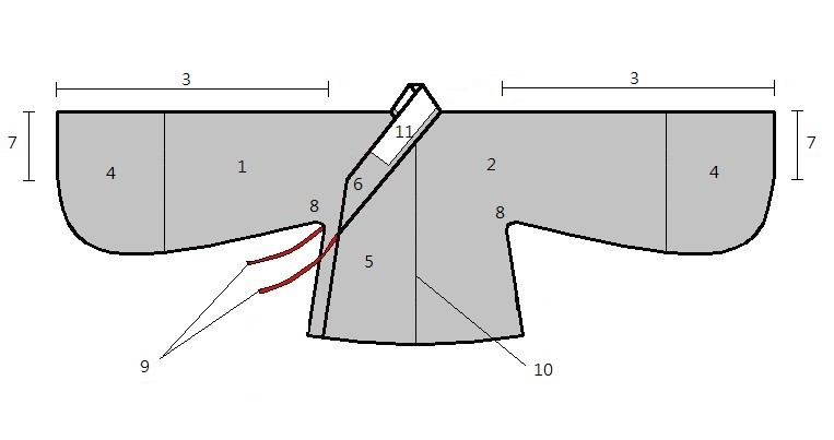 中文（香港）: 漢服各部份